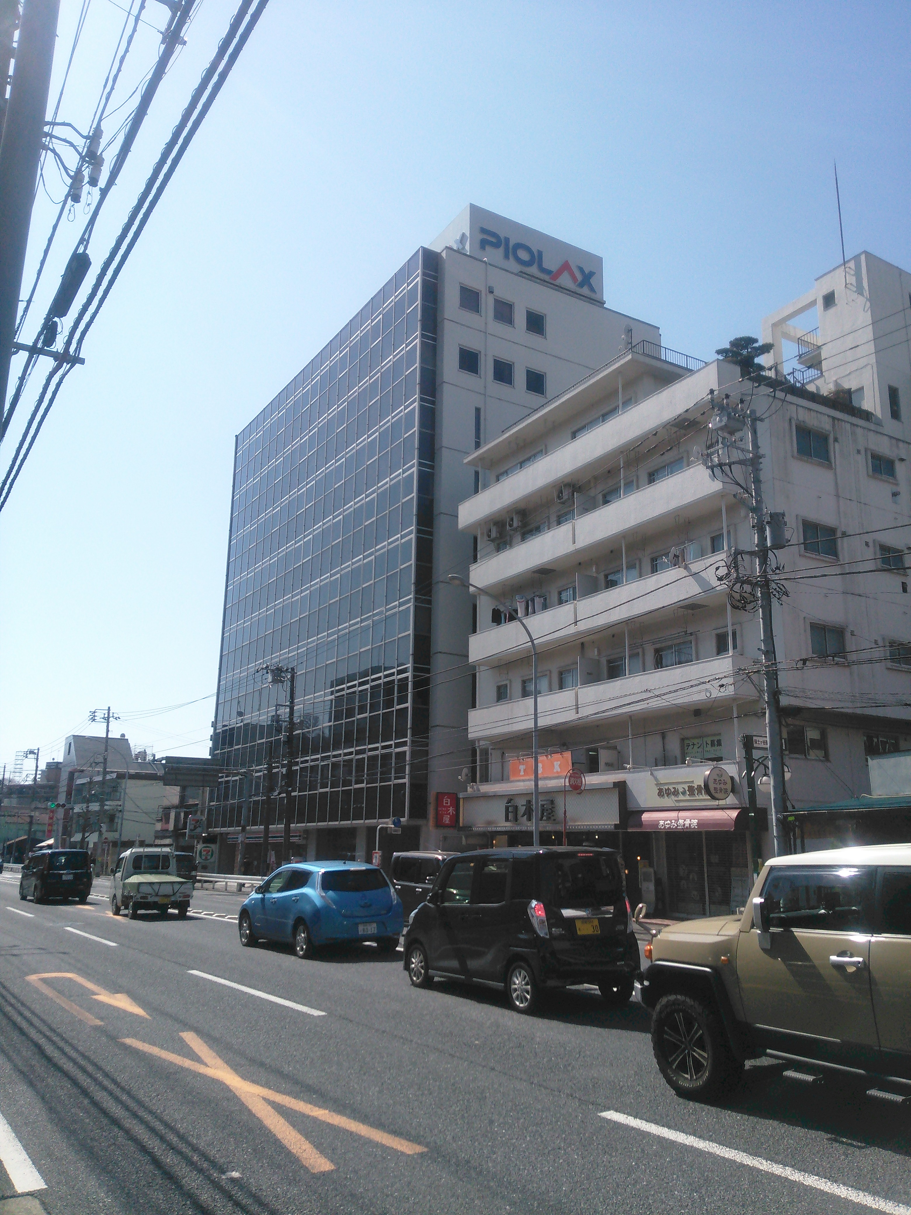 横浜市保土ケ谷区岩井町、パイオラックス本社